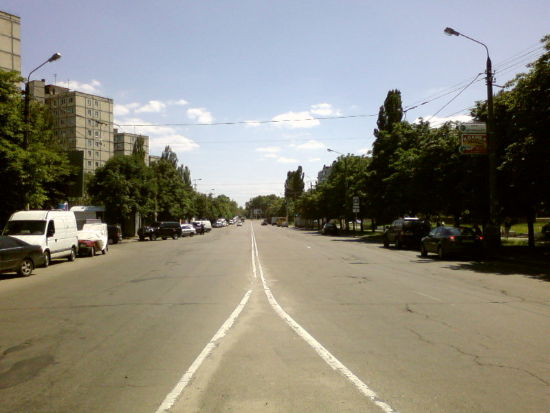 Проспект Порика